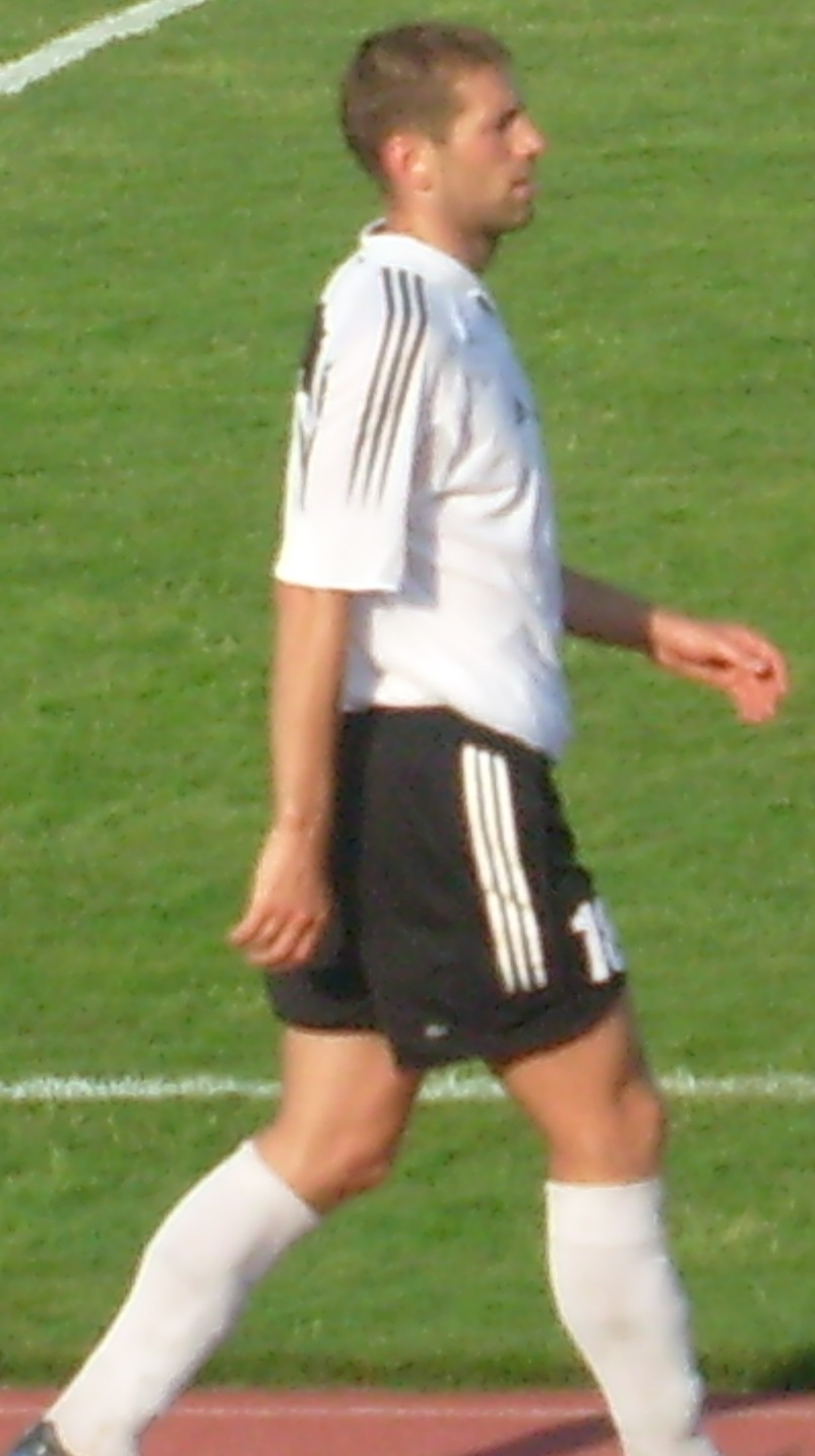 На товарищеском матче Таврия - Крымтеплица (2:1)